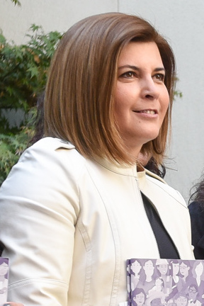 Ministra, Paula Narváez y Ministra, Claudia Pascual, se reúnen con mujeres líderes de medios de comunicación y redes sociales para analizar acciones que mejoren el abordaje público de los casos que afectan a mujeres que han sufrido violencia.